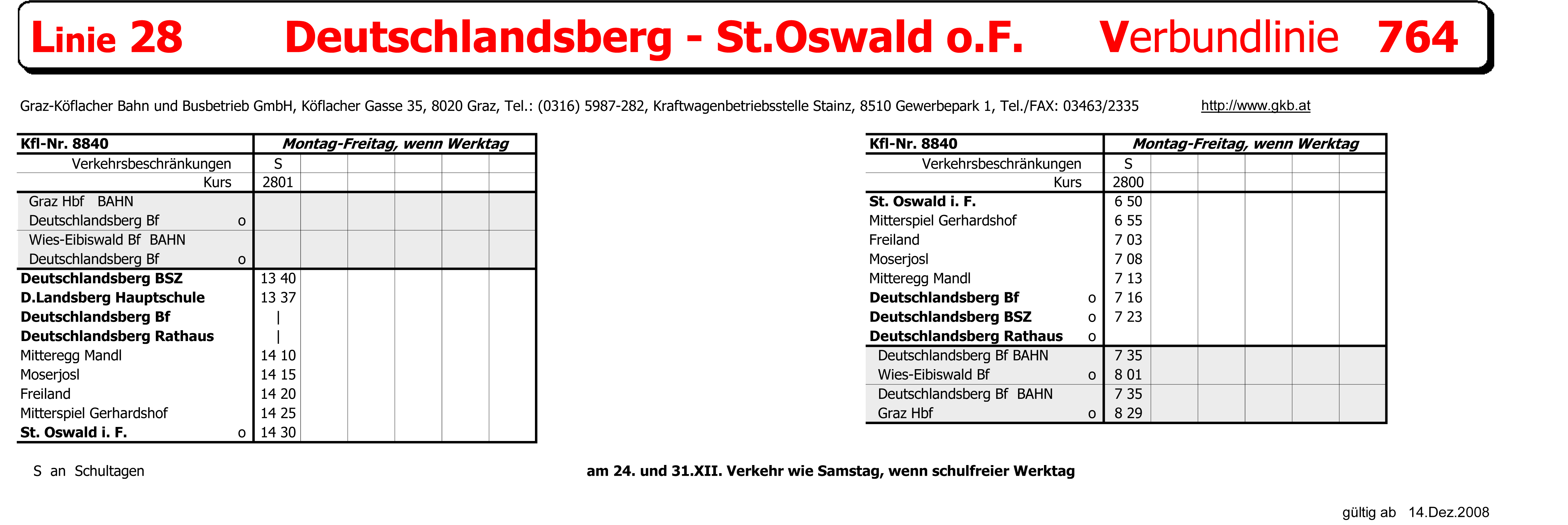 Fahrplan der Autobuslinie zwischen Deutschlandsberg und St. Oswald in Freiland mit unterschiedlichen Ortsbezeichnungen "in Freiland" und "ob Freiland" im selben Schriftstück.